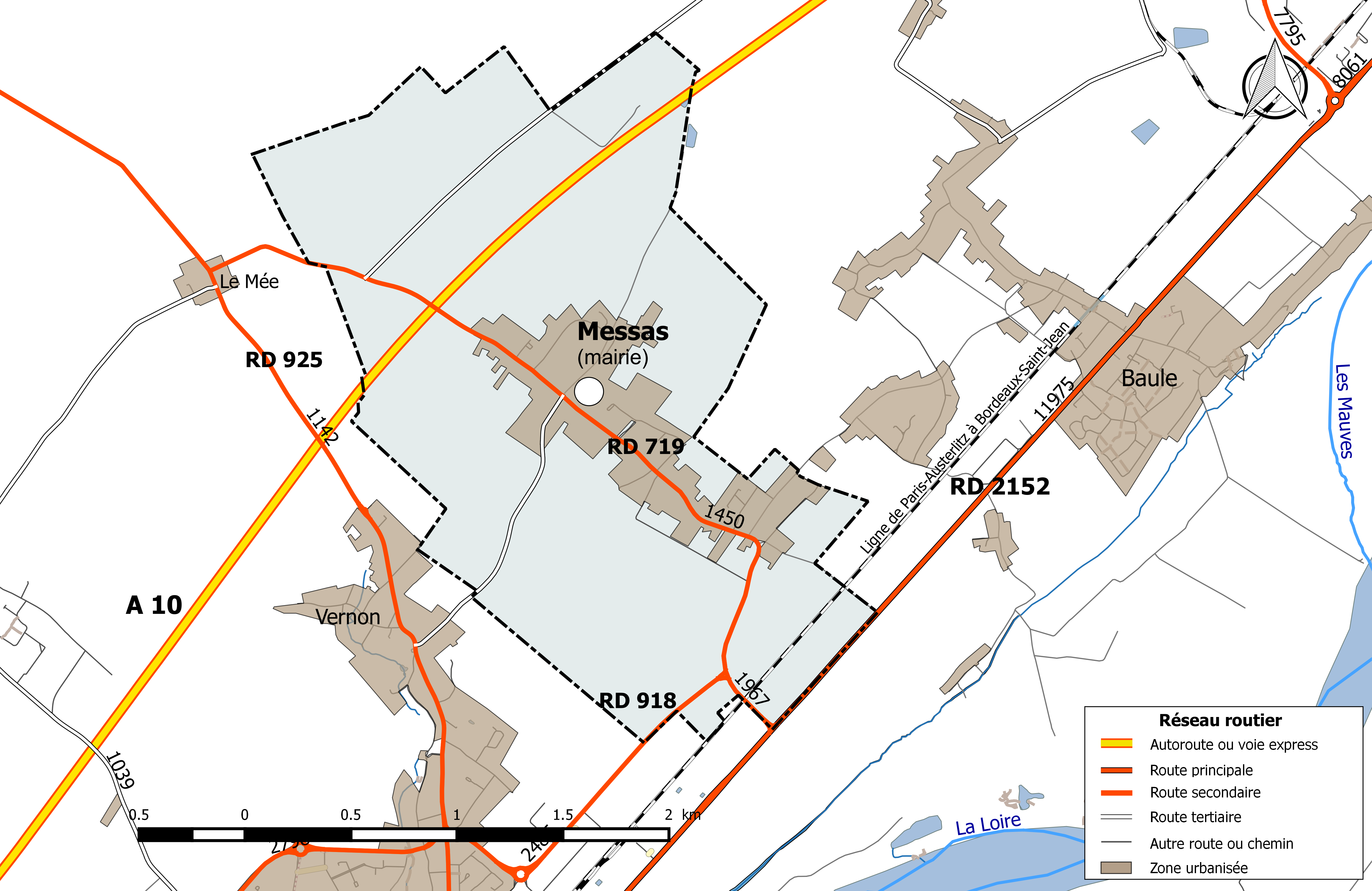 Carte du réseau routier de la commune de Messas.